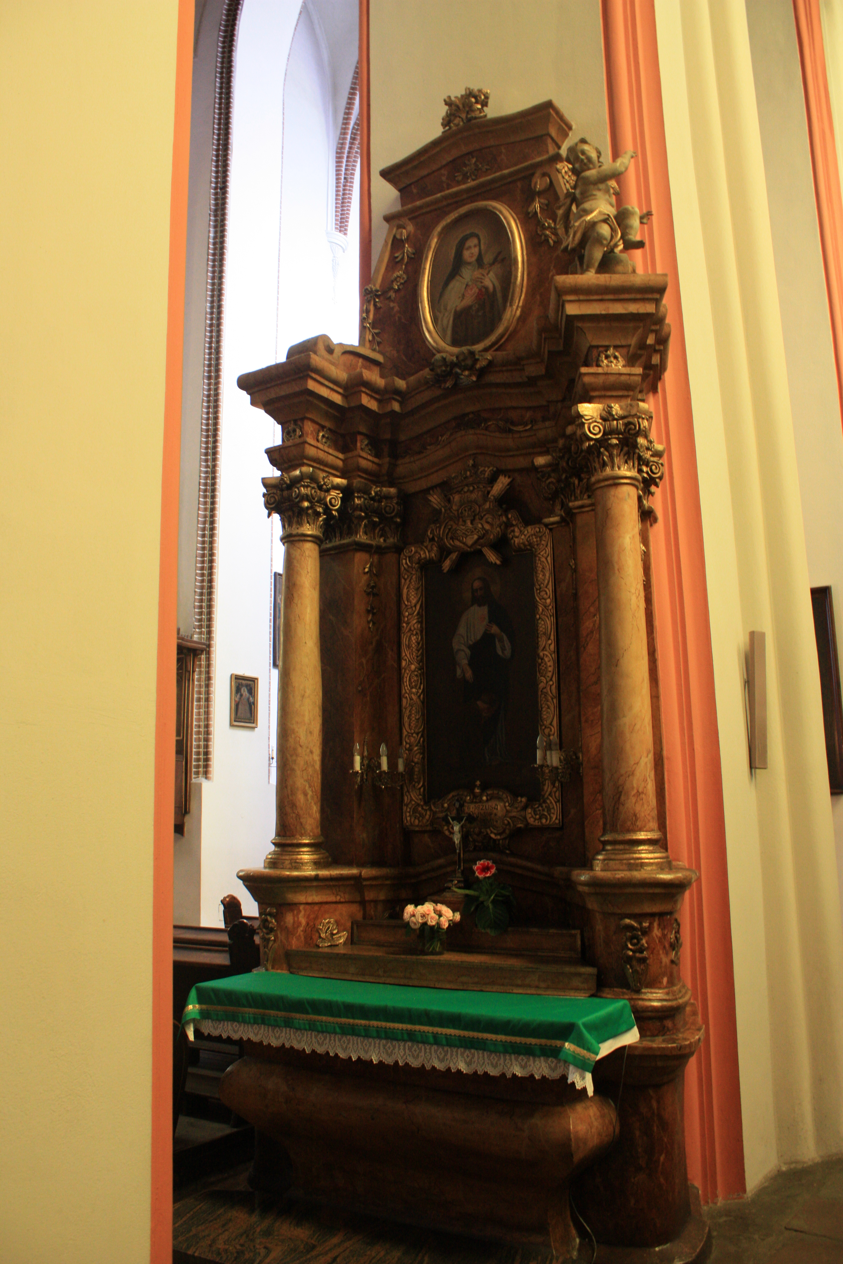 Kościół Bożego Ciała w Poznaniu. Boczny ołtarz Najświętszego Serca Pana Jezusa.